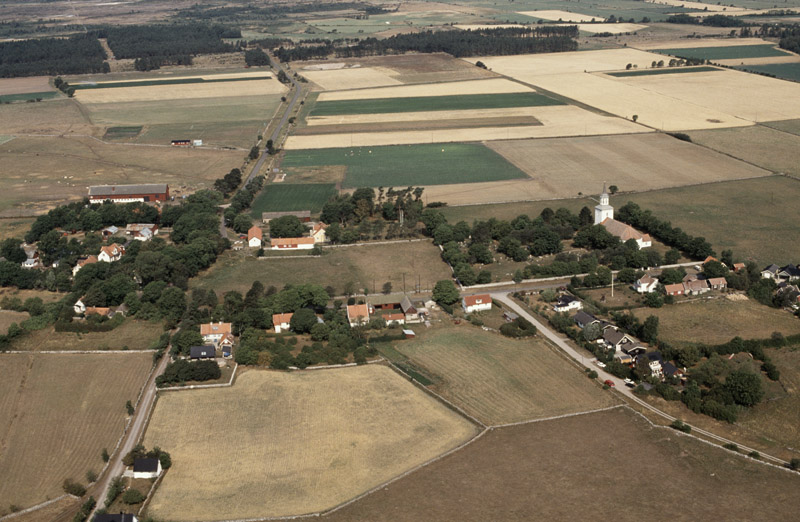 Sandby kyrka. Bilden är tagen mot (väderstreck): Ö Motiv: Sandby Nyckelord: Flygbilder, Riksintressen, Världsarv Kategori: Slättbygd, Kyrkomiljö Sandby kyrka. Bilden är tagen mot (väderstreck): Ö.